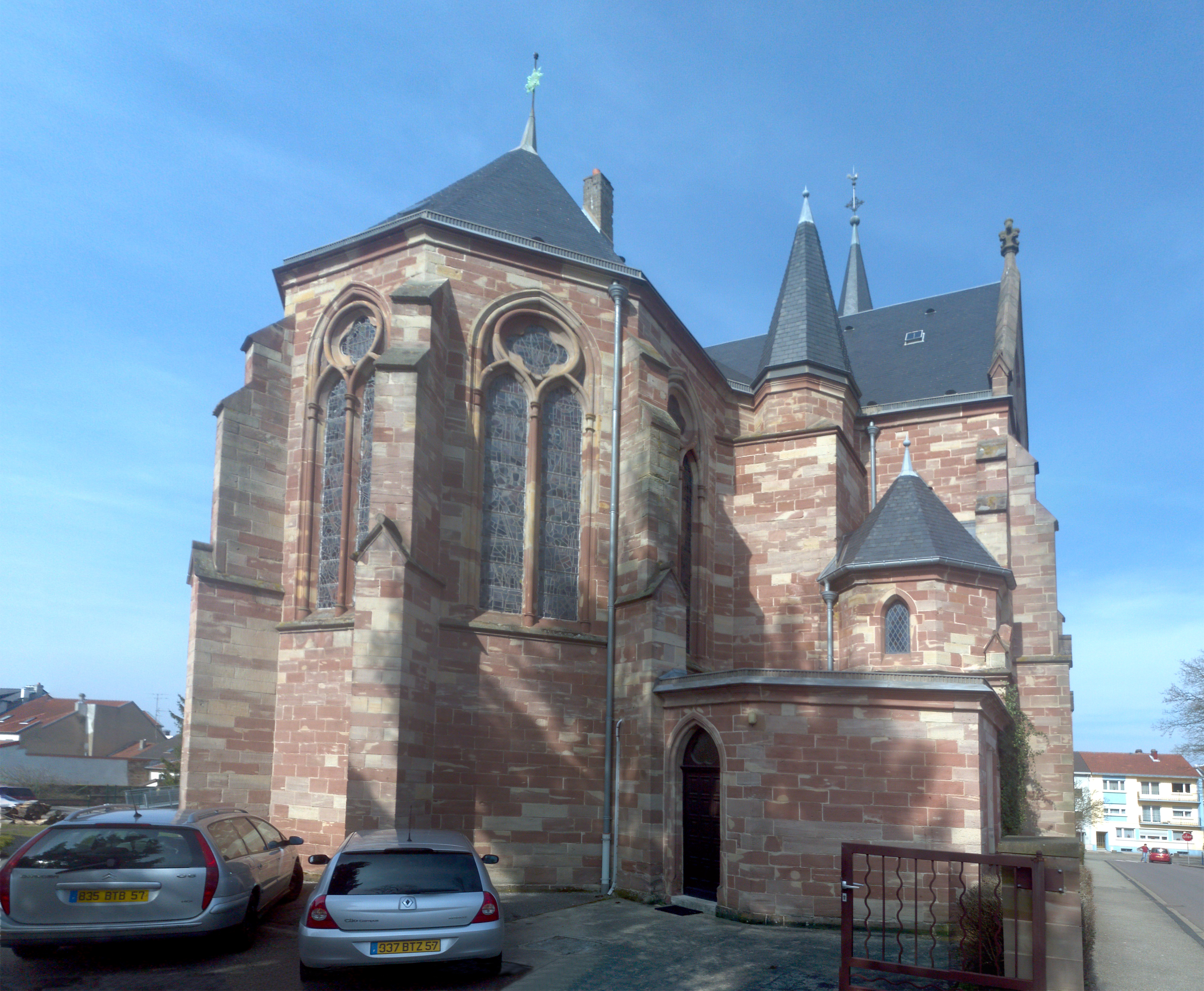 Protestantisch-lutherische Pfarrkirche Forbach, Südecke